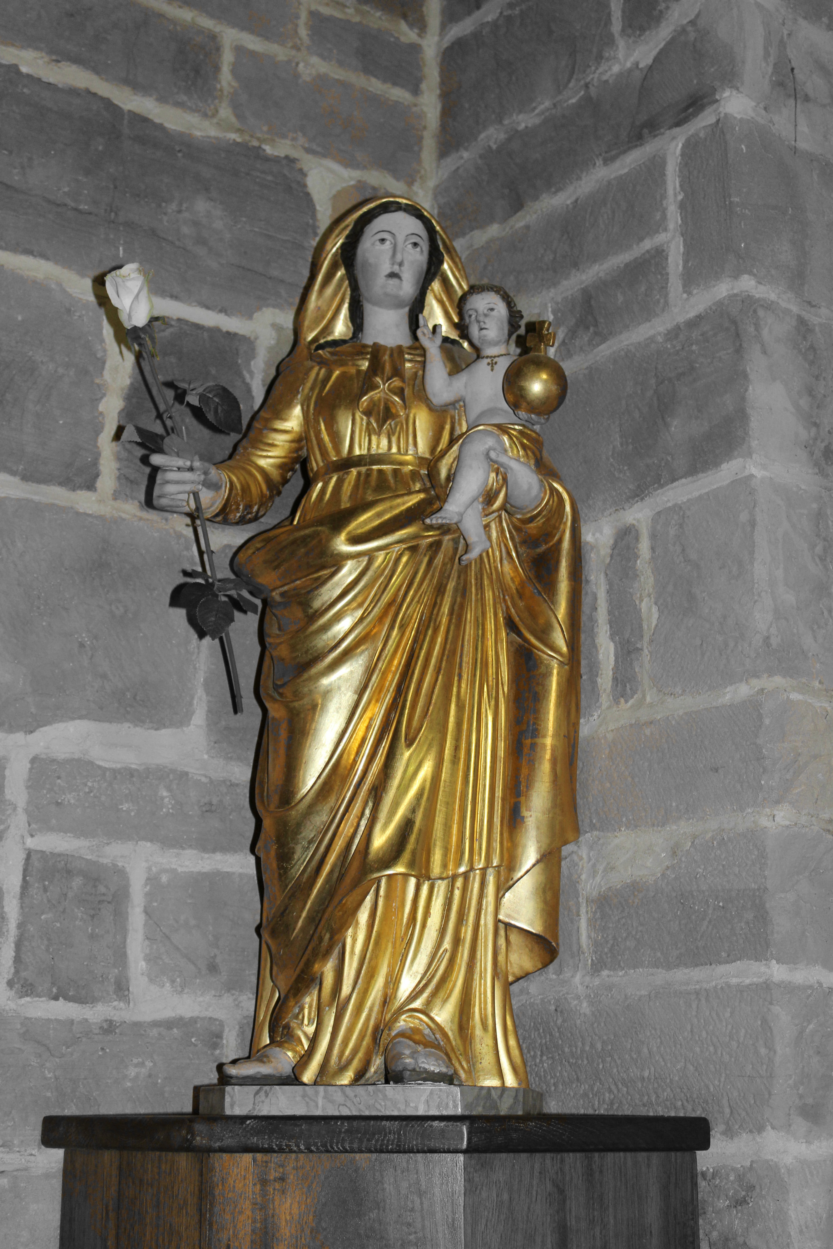 Vierge à l'Enfant de l'église Saint-Vincent à Igon (64)